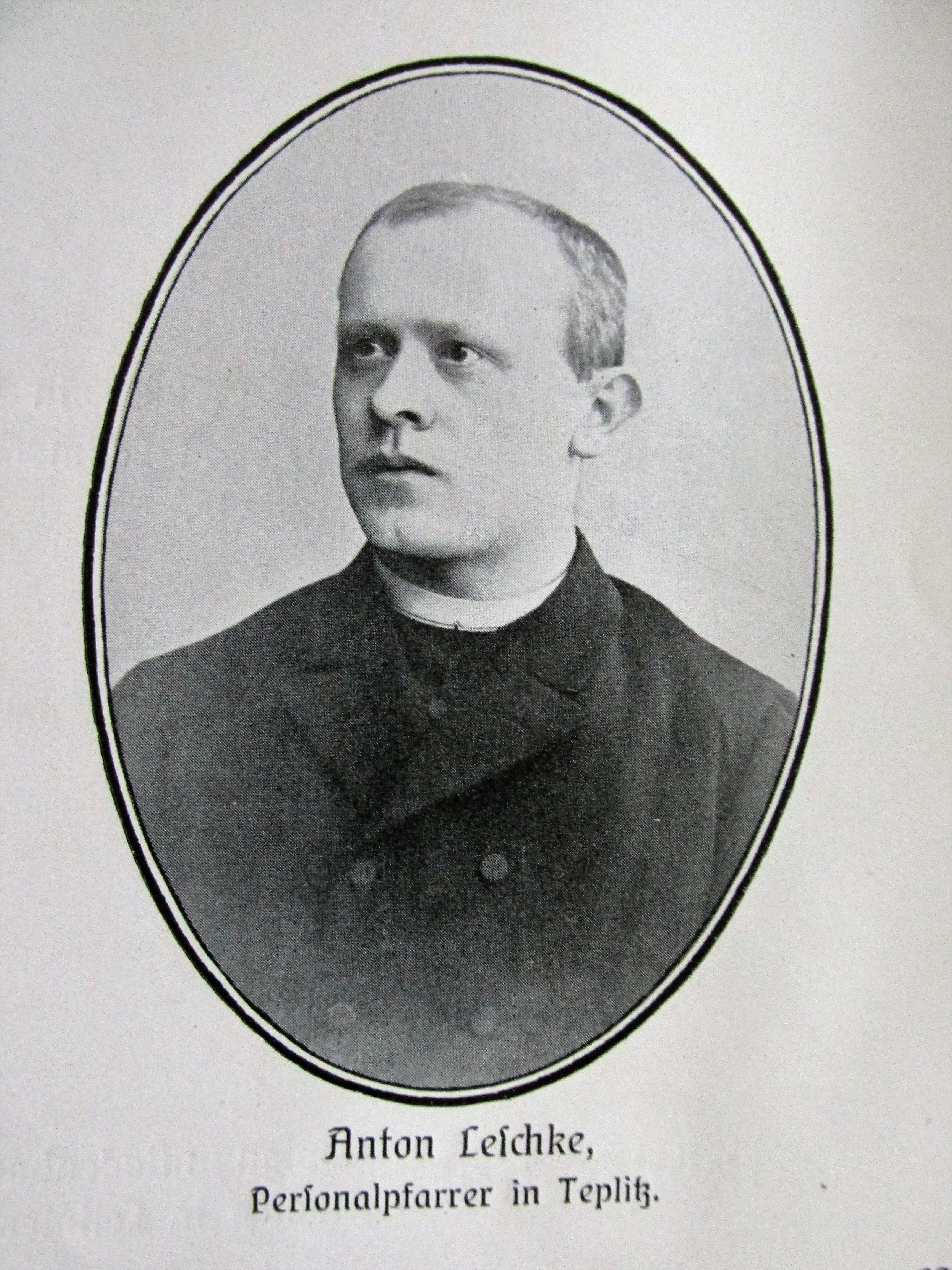 P. Anton Leschke; * 28. 10. 1856 Suchá (okres Ústí nad Labem), čp. 12; syn: Anton Leschke, syn Antona Leschke a Theresie roz. Grund; Marie Anna, dcera Franze Grunda a Anny roz. Schütz; navštěvoval chlapecký seminář v Bohosudově; navštěvoval biskupské teologické učiliště v Litoměřicích; kaplan v Novém Městě u Frýdlantu; katecheta na měšťanské škole v Lovosicích; katecheta na měšťanské škole v Teplicích (od 1889) + osobní farář